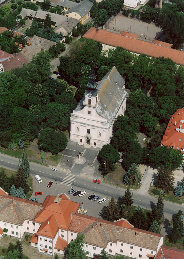 Csongrád - Hungary - Europe